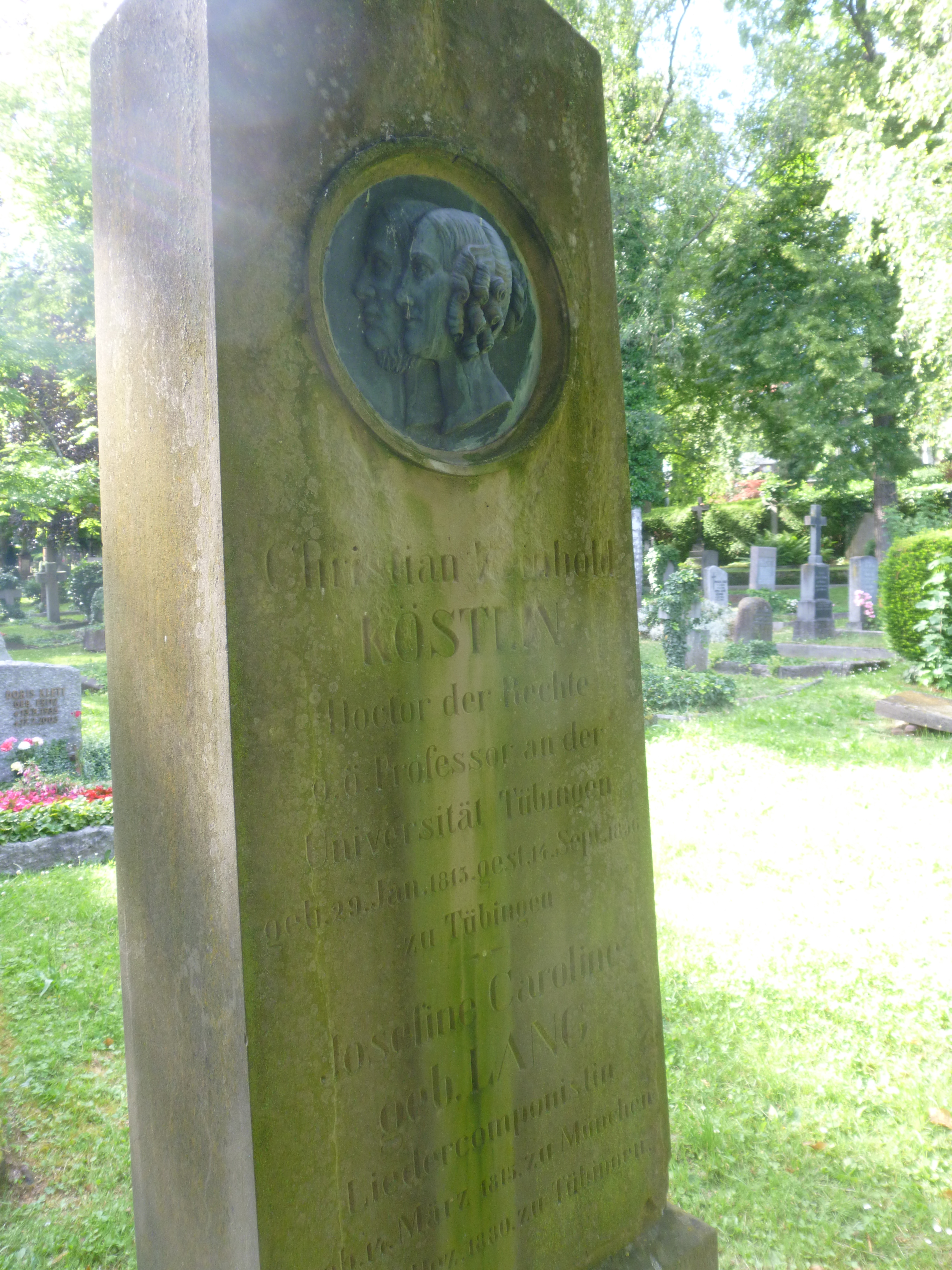 Josephine Caroline Lang Stadtfriedhof Tübingen